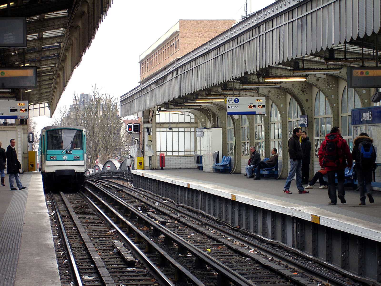 Station Jaurès de la ligne 2 du métro de Paris, France.